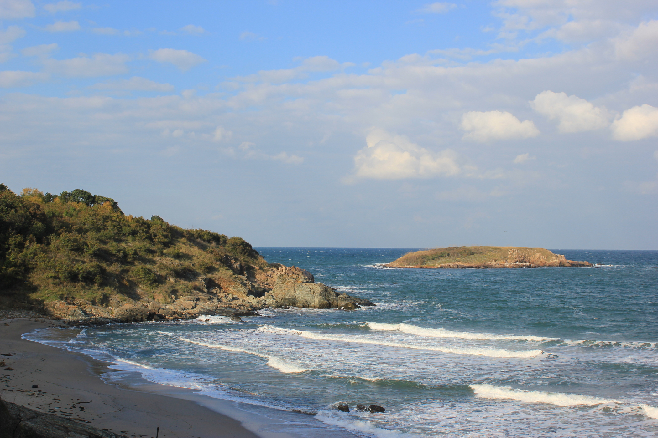 Schwarzmeerküste und St.-Thomas-Insel (Schlangeninsel) südlich von Djuni, Bulgarien.